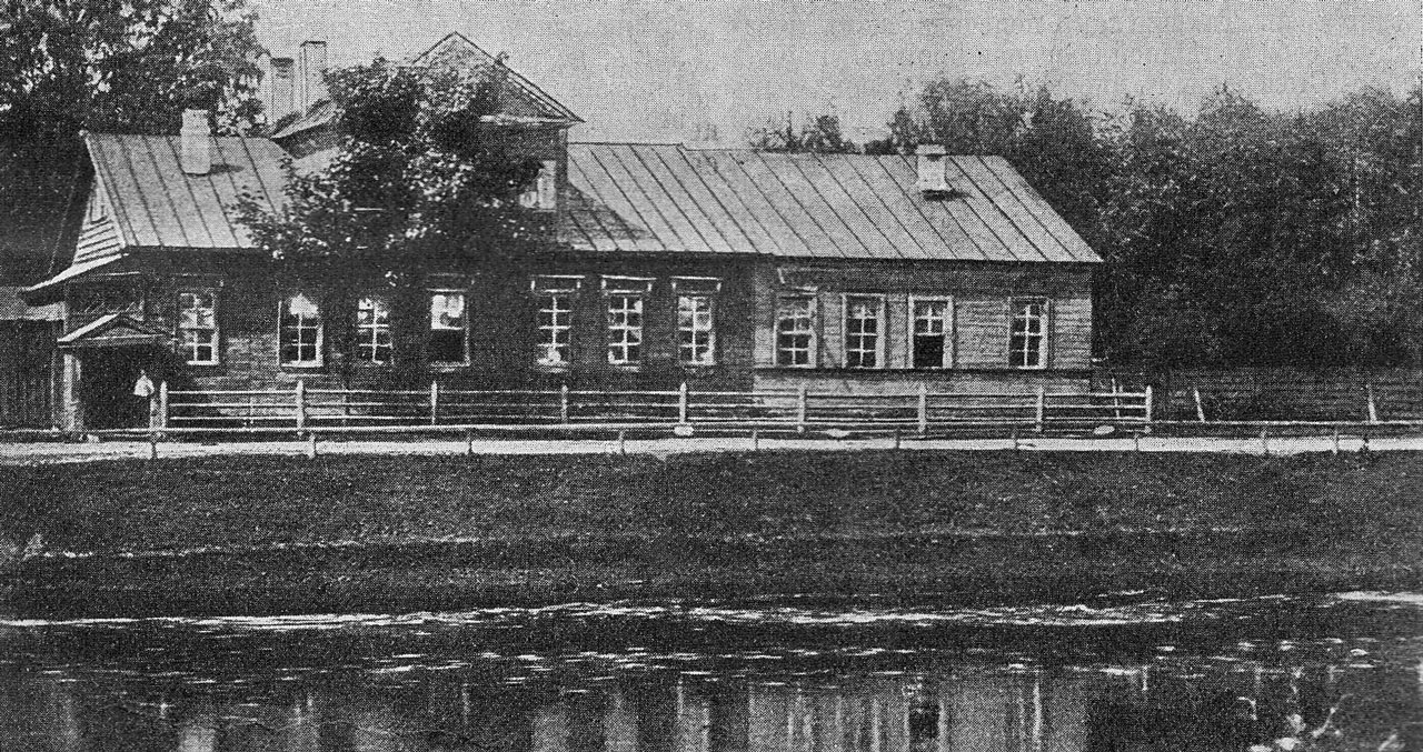 Nikolai Rimsky-Korsakov birthplace in Tikhvin